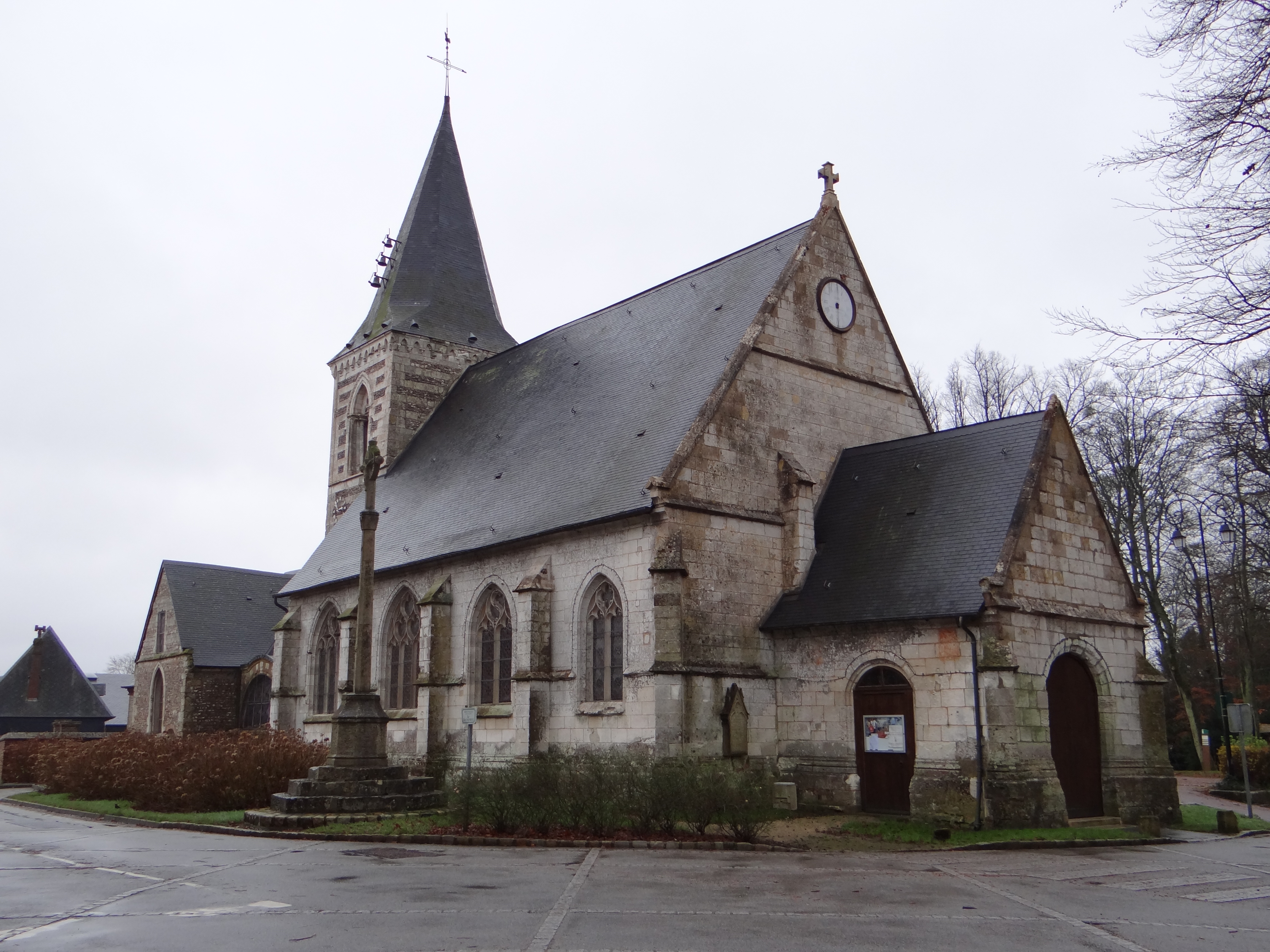 Église de Bouville, dans le centre village